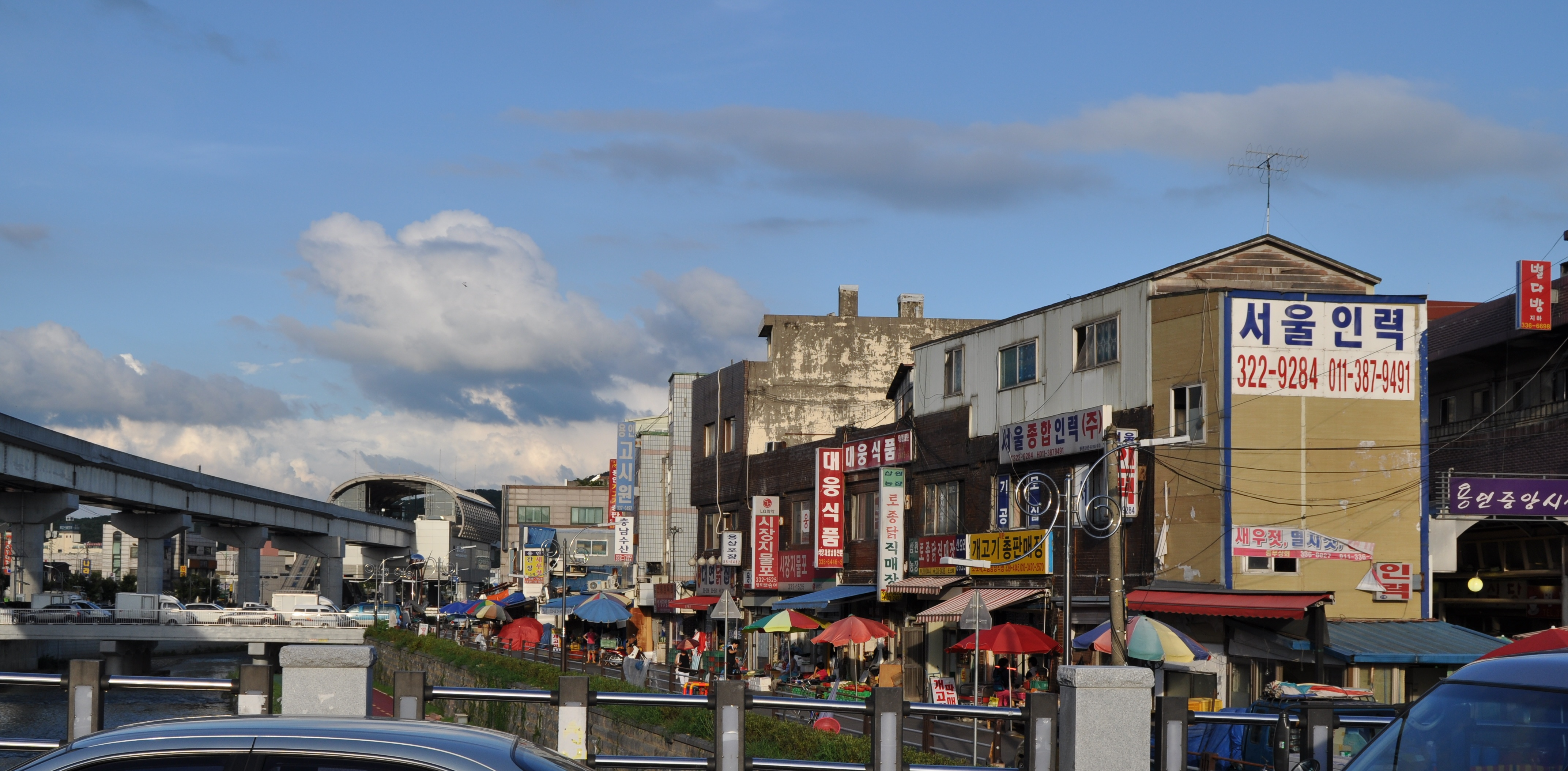 용인중앙시장의 풍경